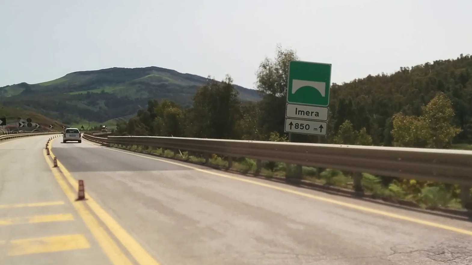 Viadotto Imera sulla strada statale 640 “degli Scrittori”, nei pressi dello svincolo Imera.